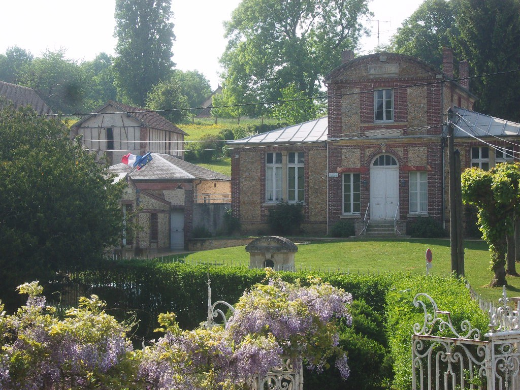 Neuville-Bosc (Oise, France) - mairie